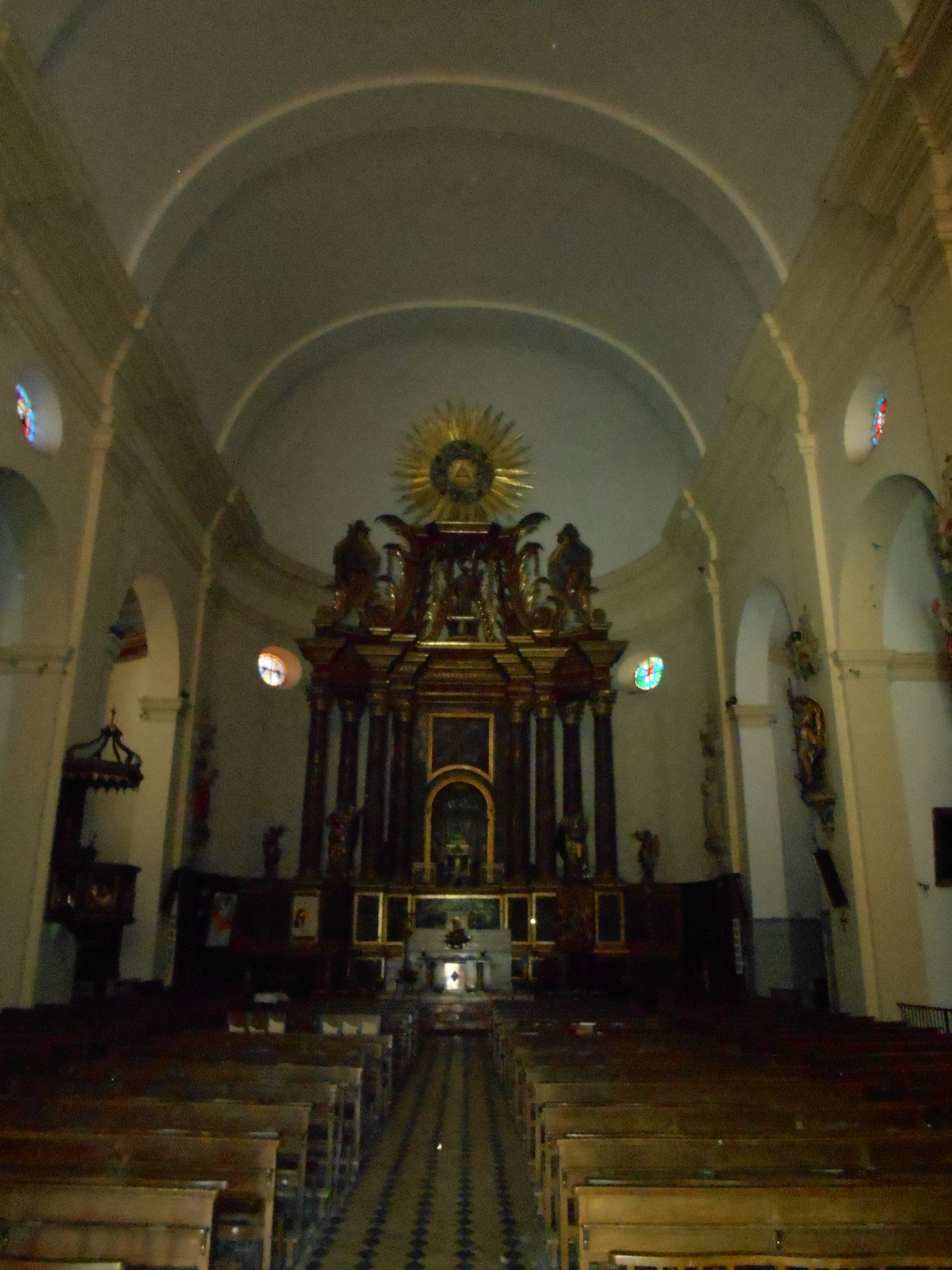 Església parroquial de Tuïr